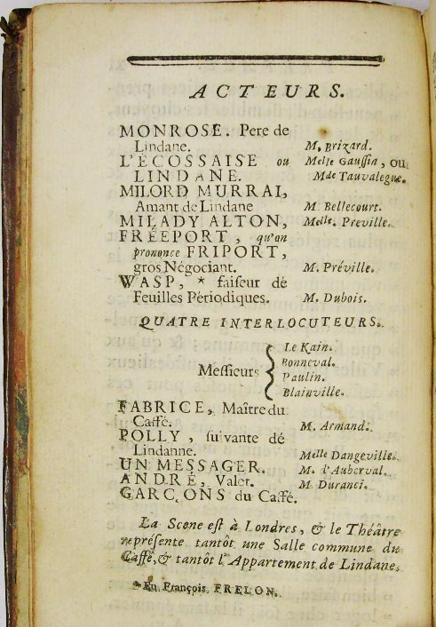 Distriburion des roles Le Caffé ou l'Ecossaise Voltaire Edition d'Amsterdam 1760